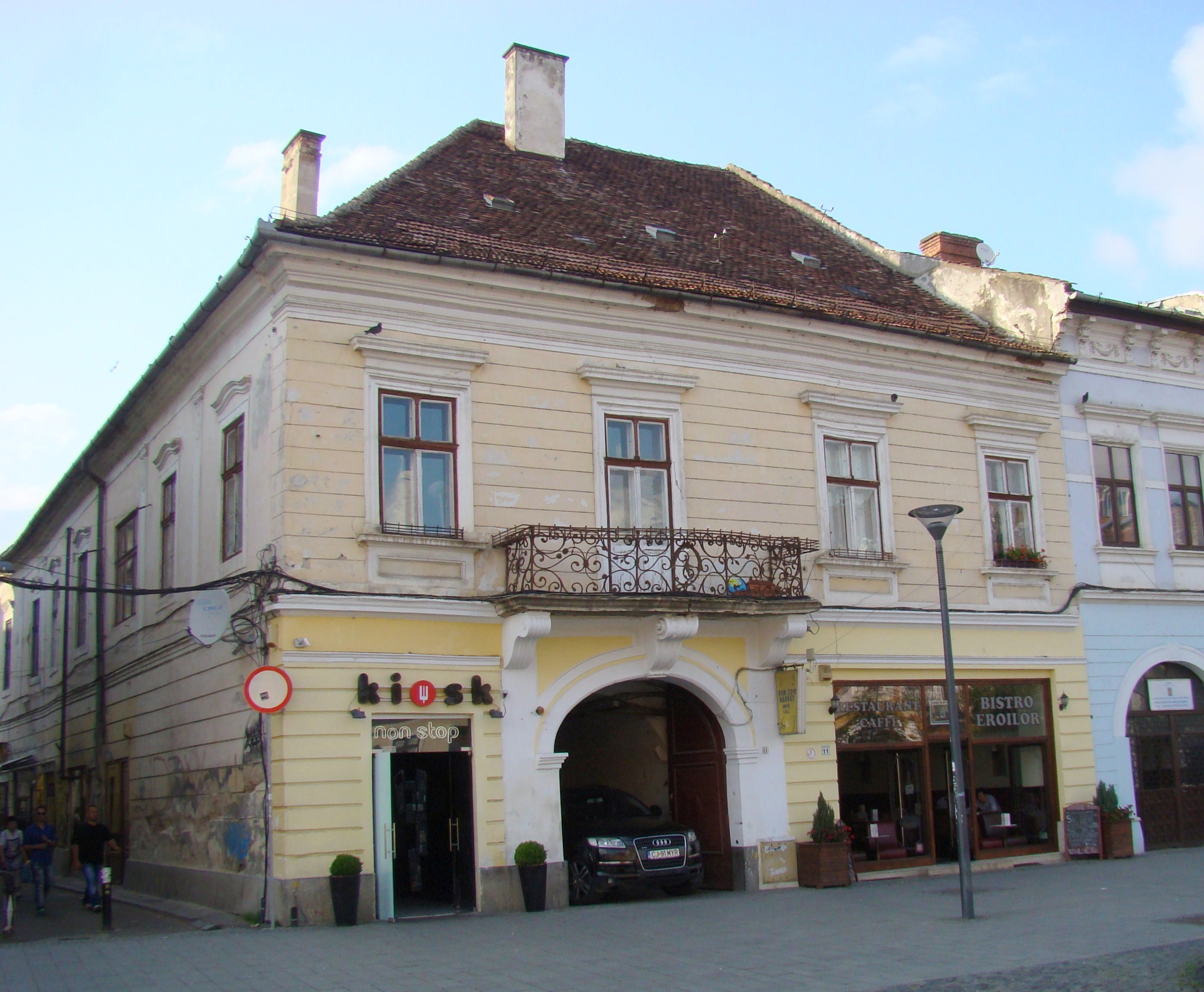 Casă monument istoric, str. Bolyai colț cu Eroilor